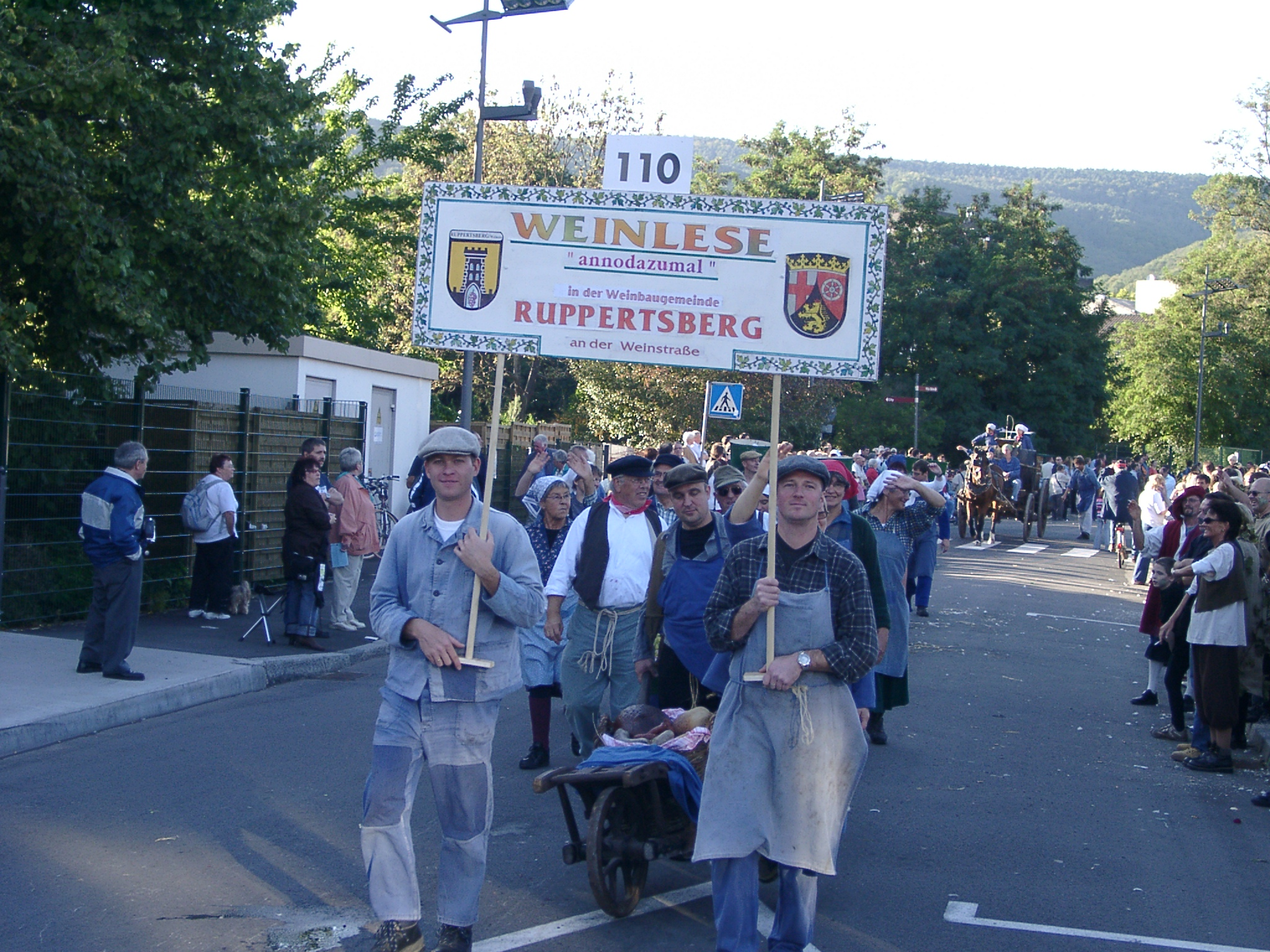 Zugnummer beim Neustadter Winzerfestzug